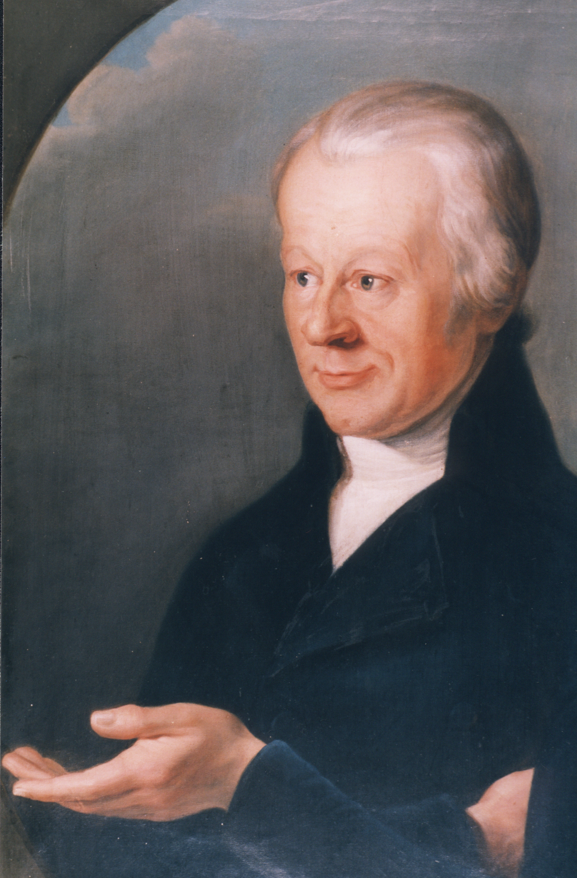 Karl Gottlob Anton auf einem Ölgemälde von von Friedrich Philipp Reinhold (* 8. Januar 1779 in Gera; † 22. April 1840 in Wien) im Sitzungssaal der Oberlausitzische Gesellschaft der Wissenschaften in Görlitz